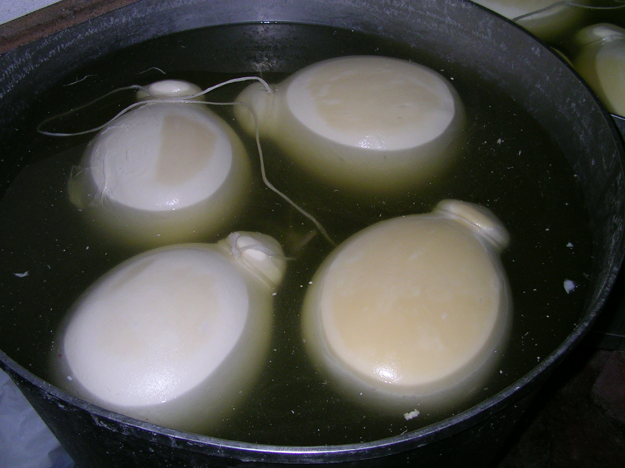 Käse aus den Madonie - Formaggio dalle Madonie